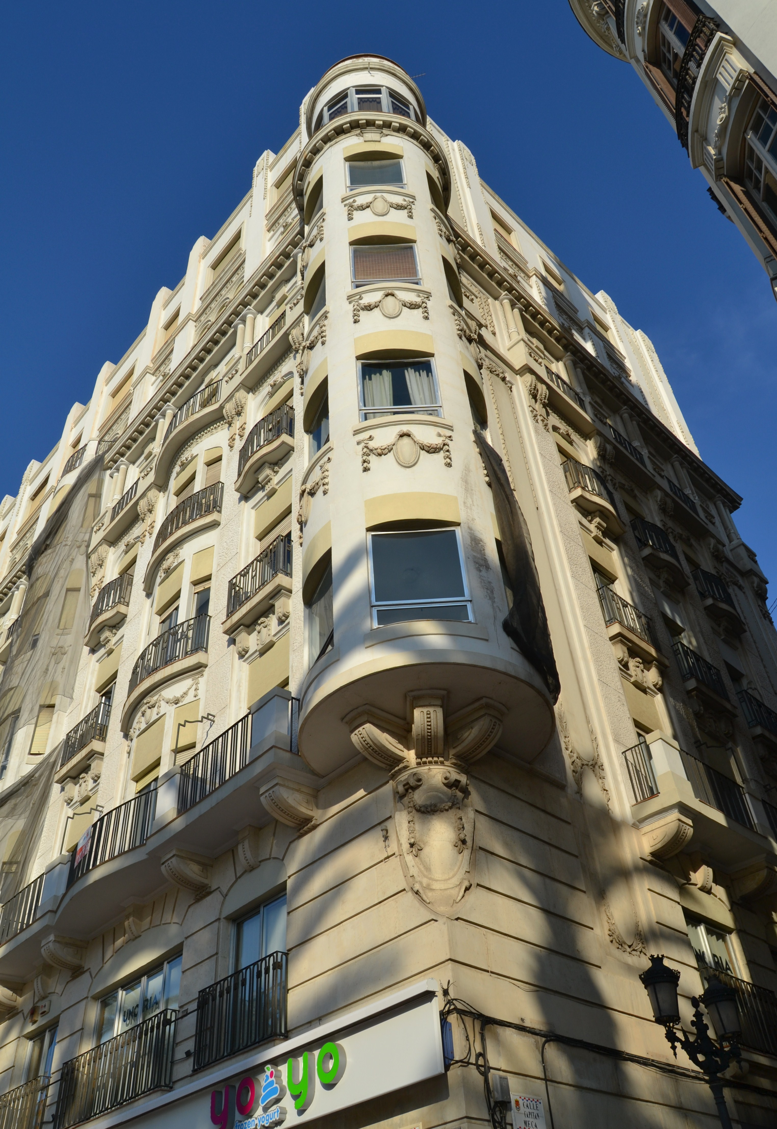 Mirador de la casa Lamaignere, Alacant.